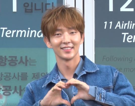 배우 이준기가 해외 일정 참석차 15일 오전 인천국제공항 제1여객터미널을 통해 대만으로 출국했다.